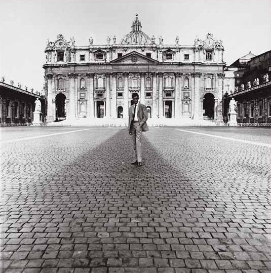 Selfportrait by Lothar Wolleh in front of the Petersdom, Roma in 1964 „Diese Aufnahme hab ich um 6:10 auf dem Petersplatz zum Abschluss meines Buches ‚Konzil’ gemacht (Selbstauslöser)